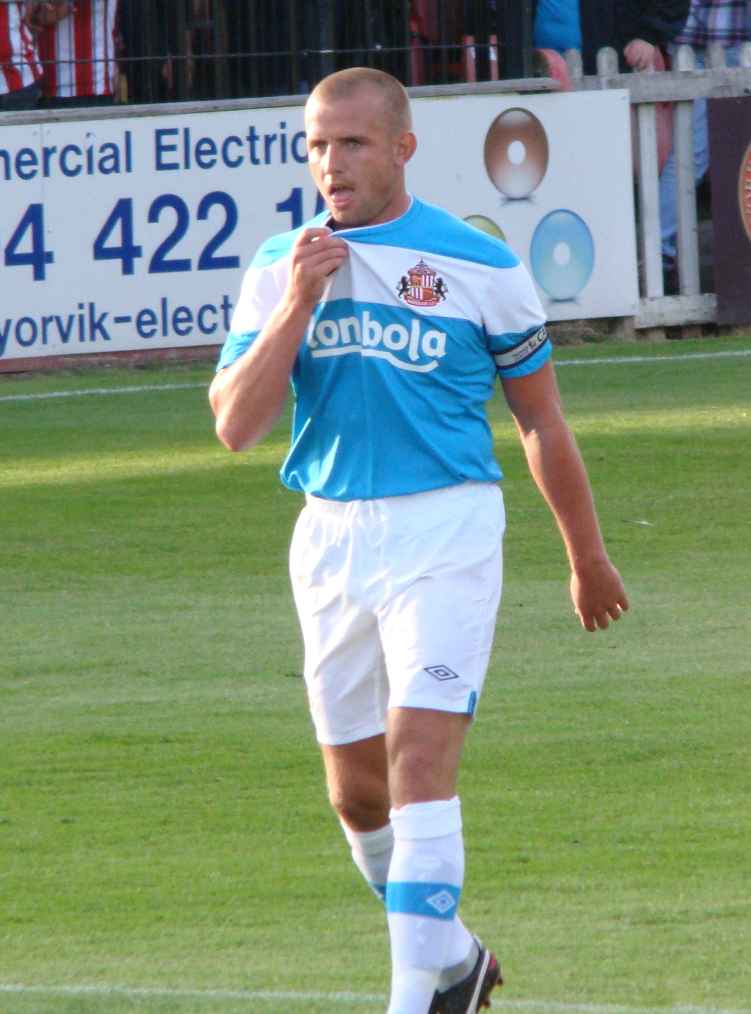 Lee Cattermole